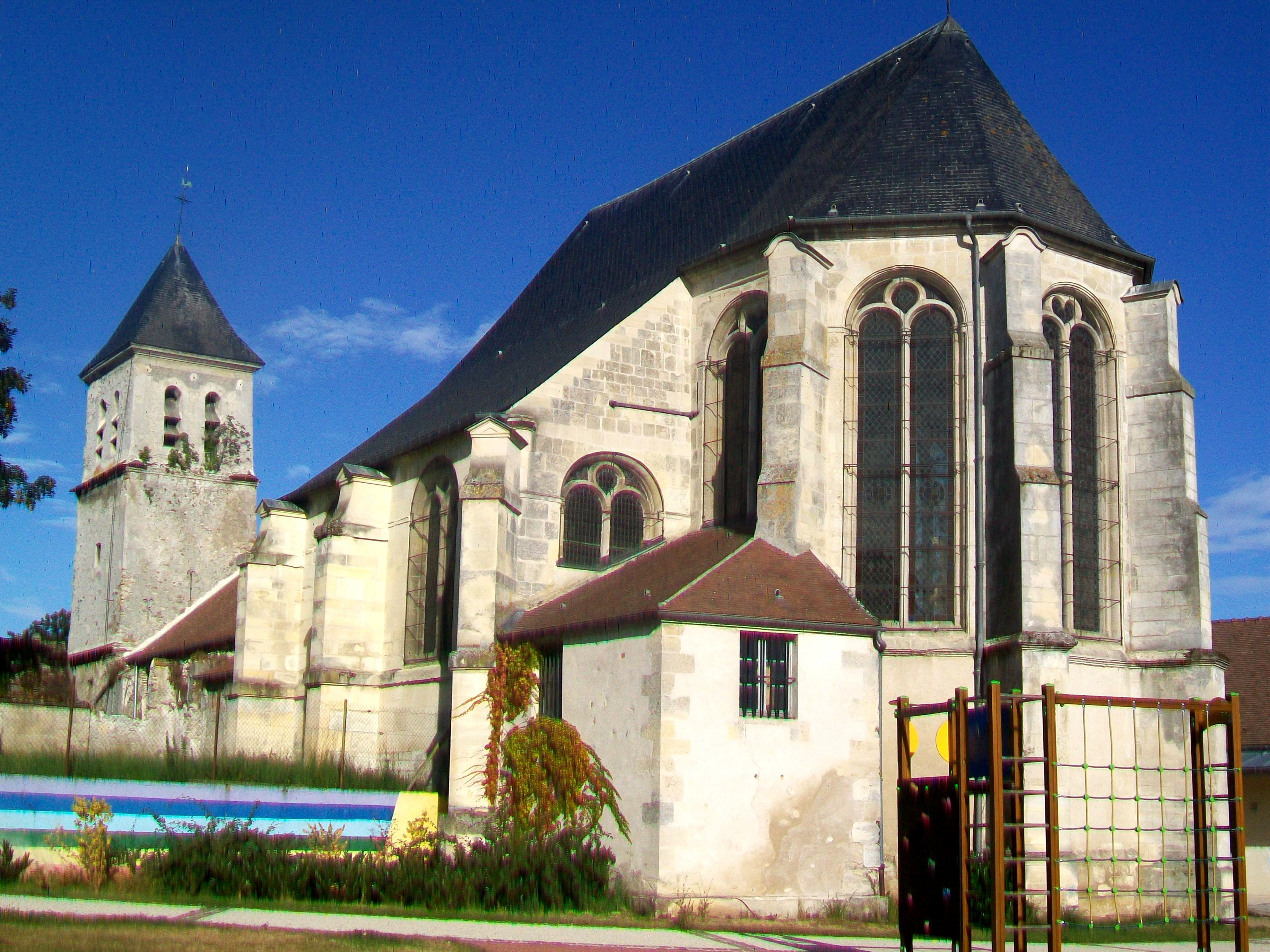 Vue d'ensemble depuis l'est.